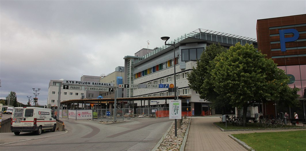 Ajoväylä Kuopion yliopistollisen sairaalan (KYS) Puijon sairaalan pääovea kohti (rakennuksen valkoisessa osassa, kuvan vasemalla laidalla) Kuopion Puijonlaakson kaupunginosassa.